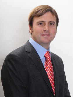 Diputado de Chile, Pedro Browne.